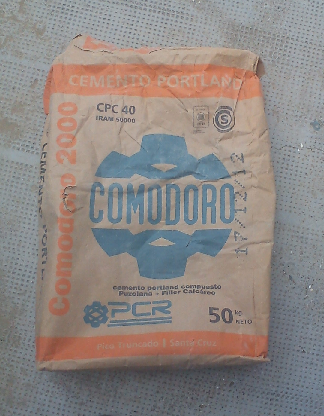 Cemento creado en la planta de Truncado